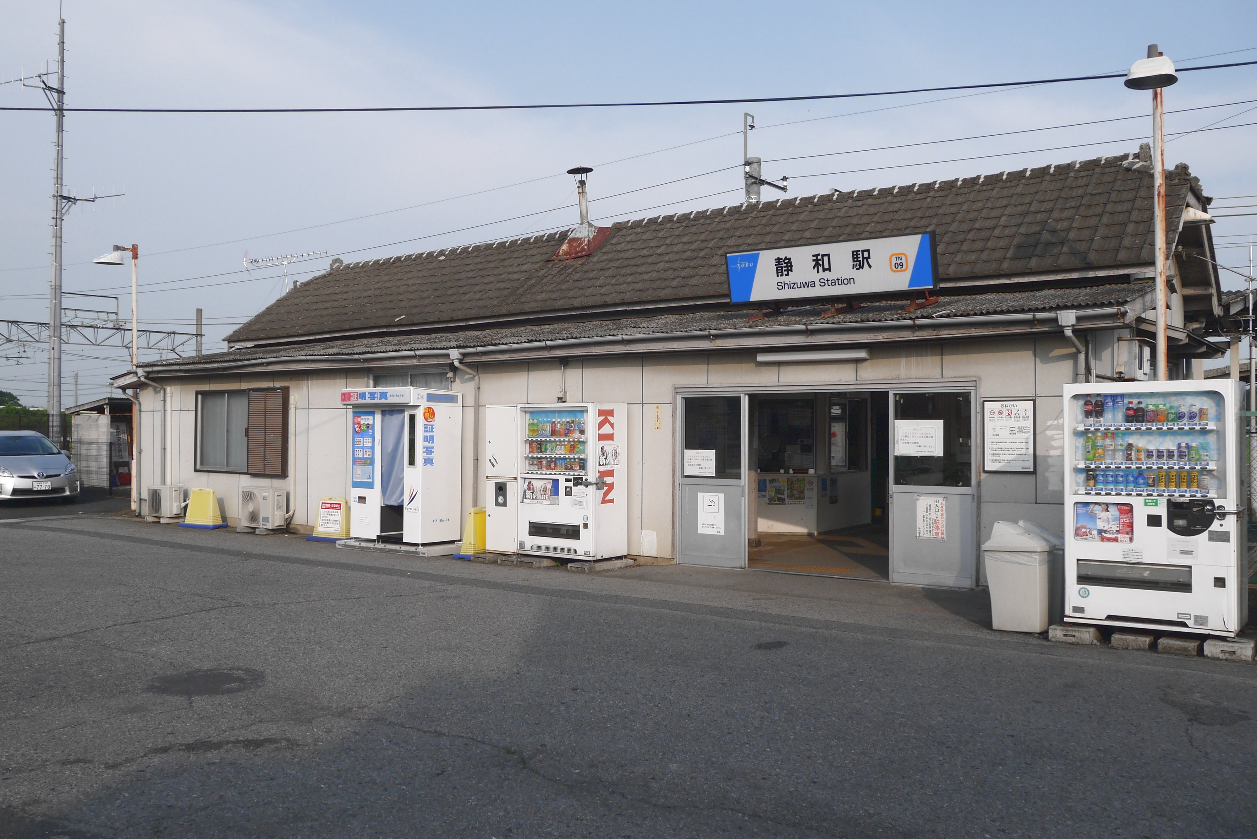 栃木県栃木市、静和駅、東武日光線 Panasonic Lumix DMC-GF5